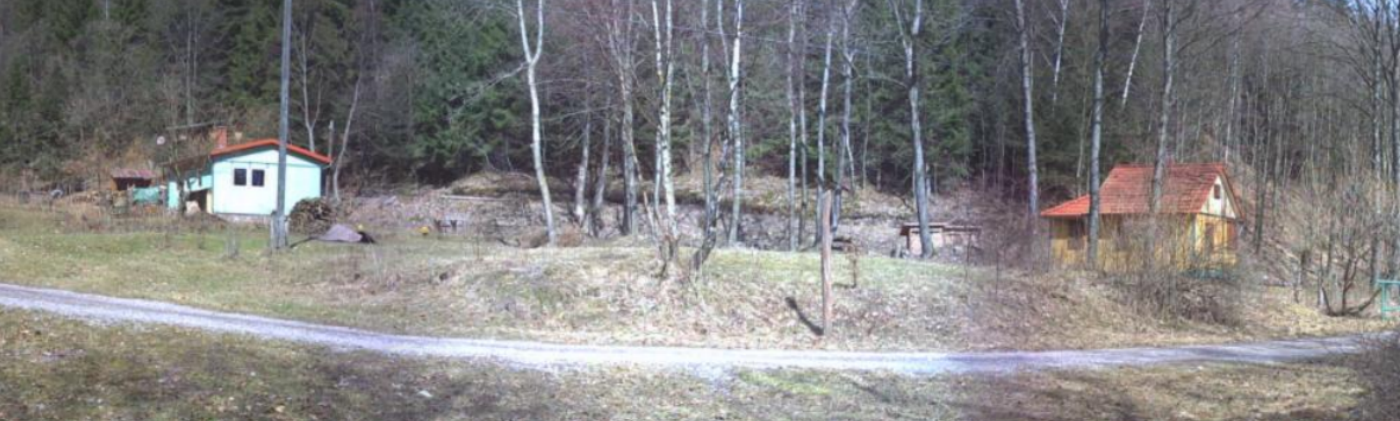 Panorama Lütschedorf